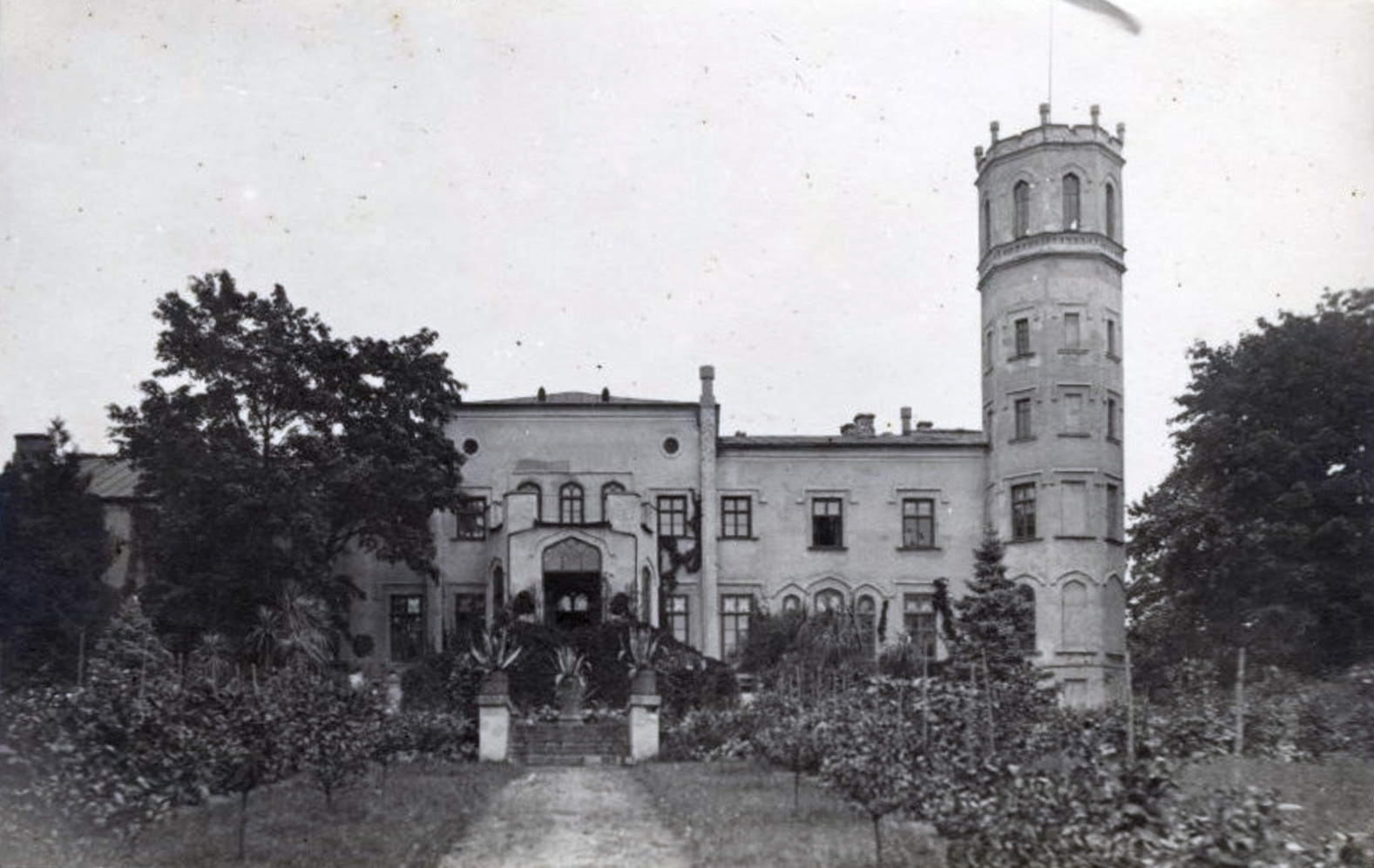 Schloss Fianden (Lettisch: Lazberga muiza) in Lettland.